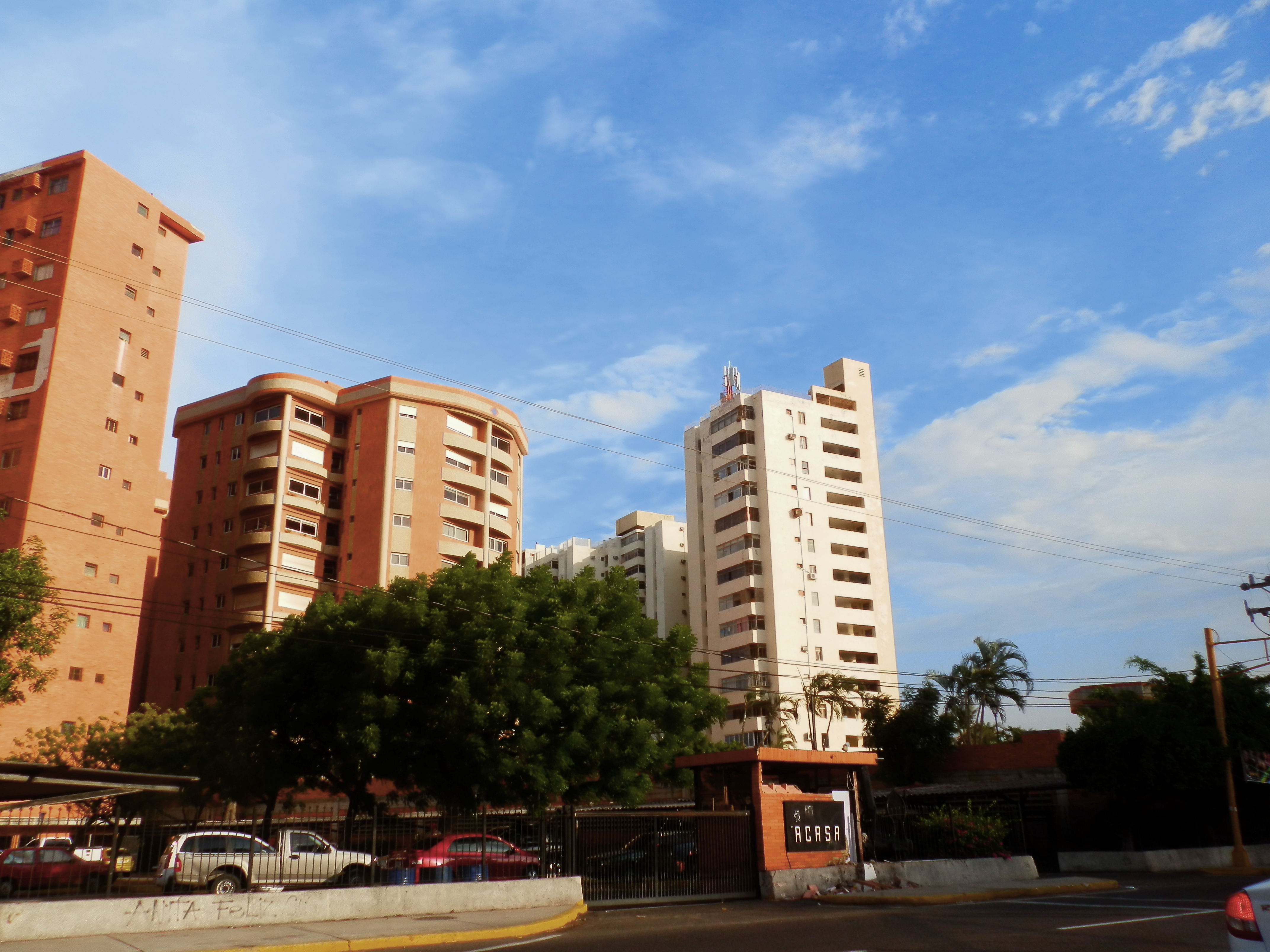 Edificios en la Avenida El Milagro, Maracaibo, Venezuela